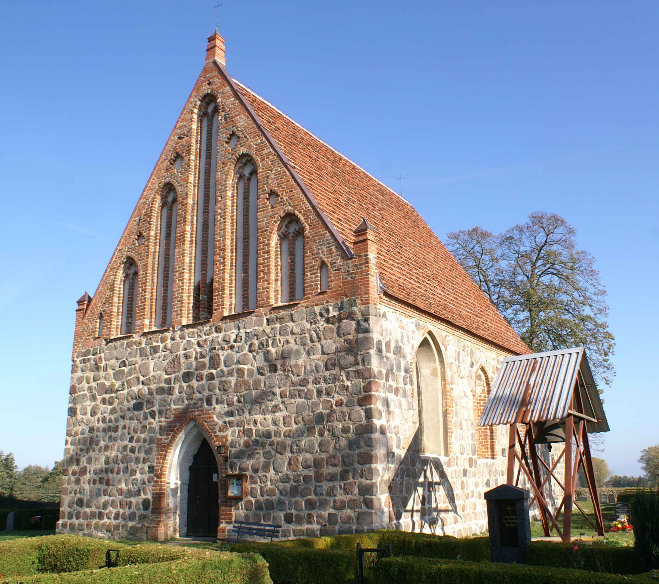 St. Nikolai zu Bauer in Wehrland, Landkreis Ostvorpommern, Mecklenburg-Vorpommern. Westgiebel